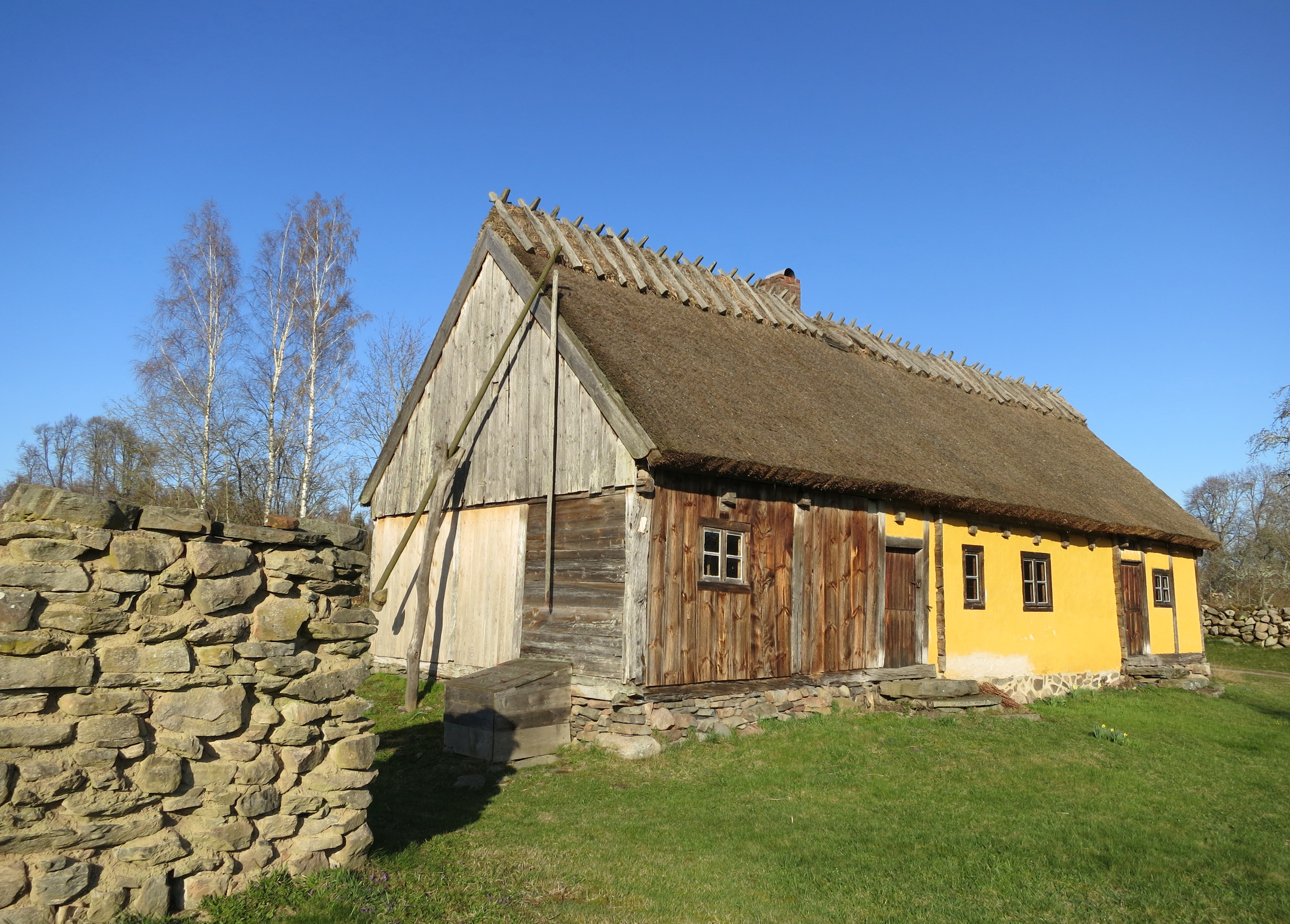 Ballingstorpsgården